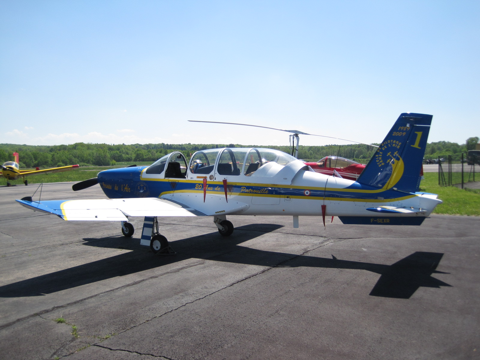 Aérodrome de Besançon-La Vèze